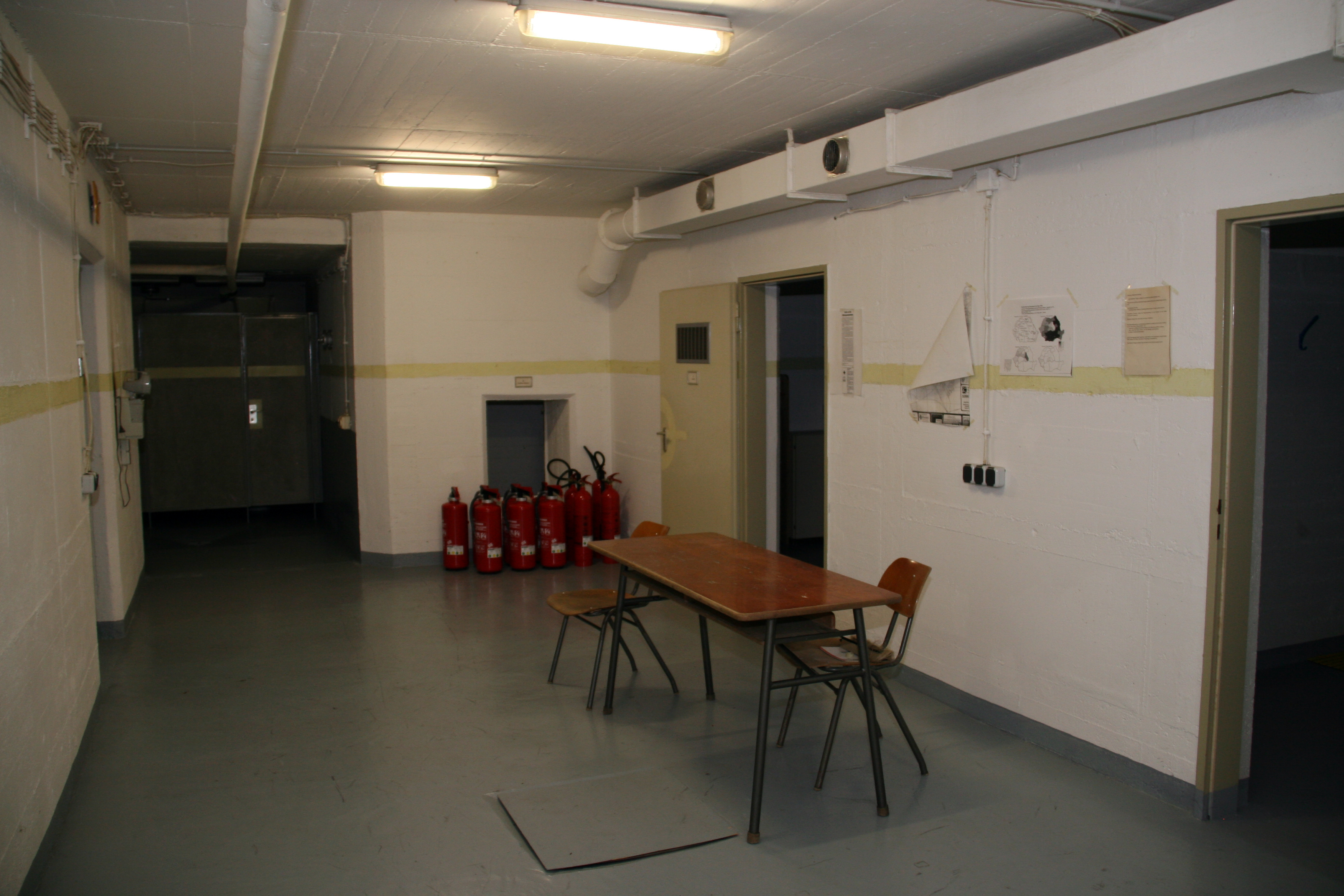 Aufnahmebereich für DDR-Übersiedler (1989) und Rumänien-Übersiedler (1990) im Hilfskrankenhaus Gunzenhausen, Nov. 2009